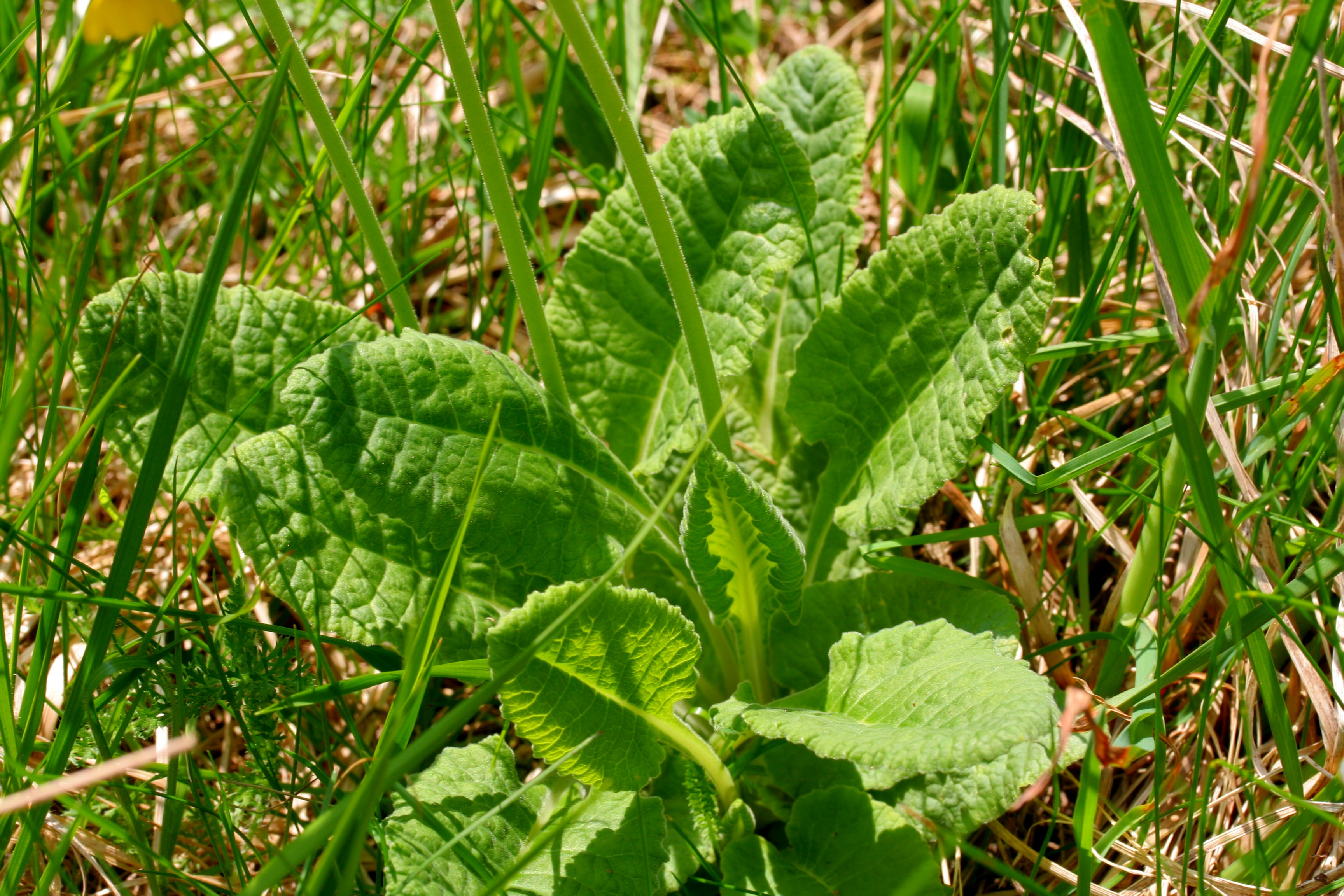 Primula_veris (Primula odorosa) Località : Pianezze, Trichiana (BL), 859 m s.l.m.